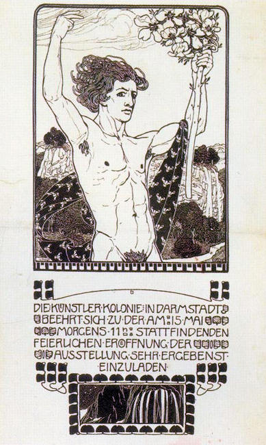 Paul Bürck Eröffnung der. Künstlerkolonie Darmstadt 1901